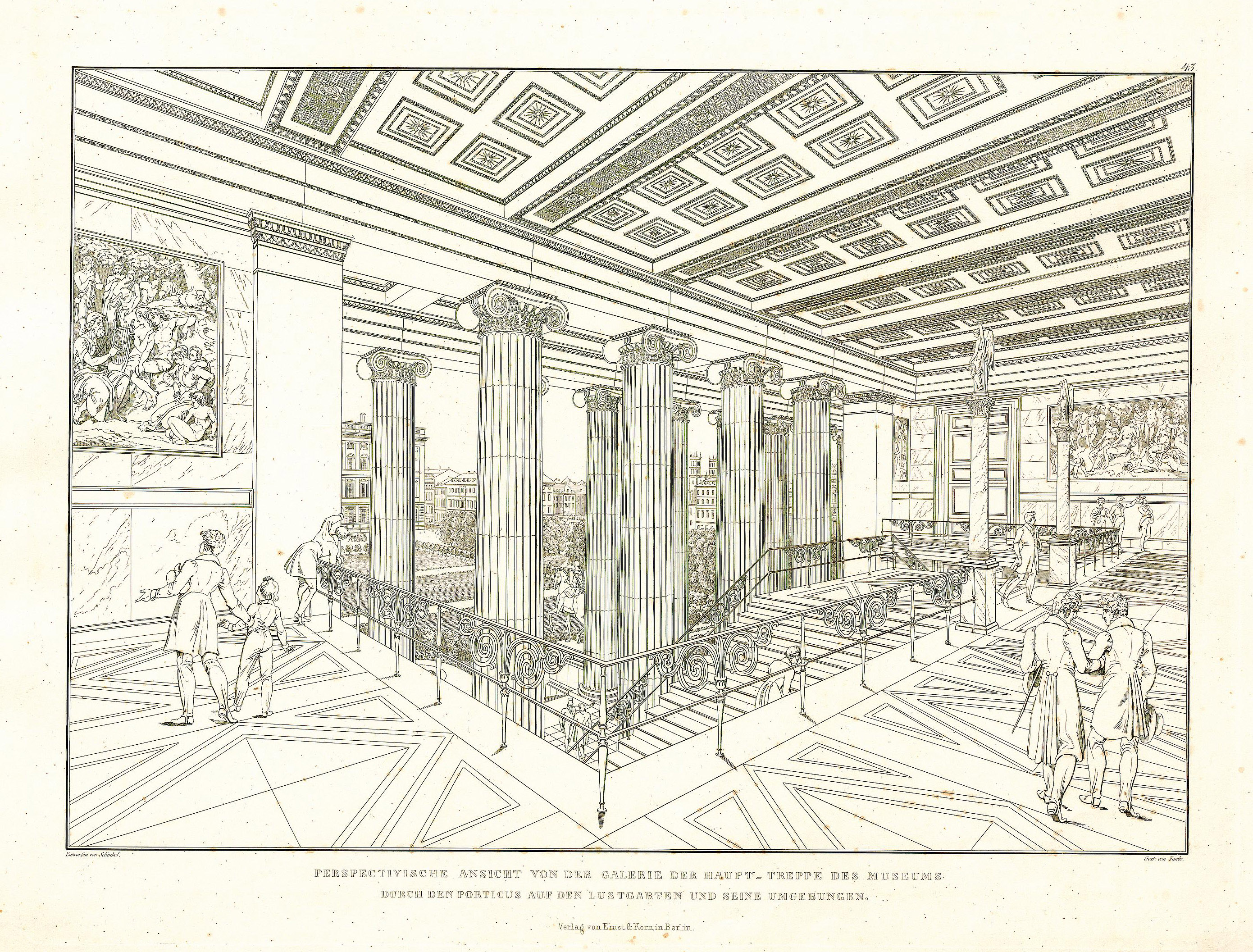 Altes Museum Berlin, Obere Treppenhaushalle von Schinkel